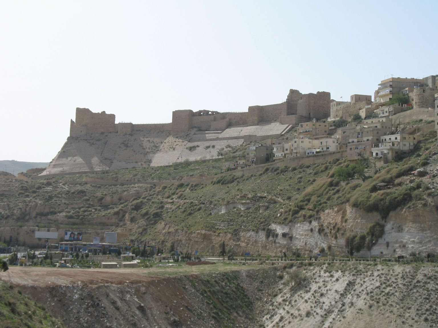 Kreuzritterburg Kerak Ansicht von Straße